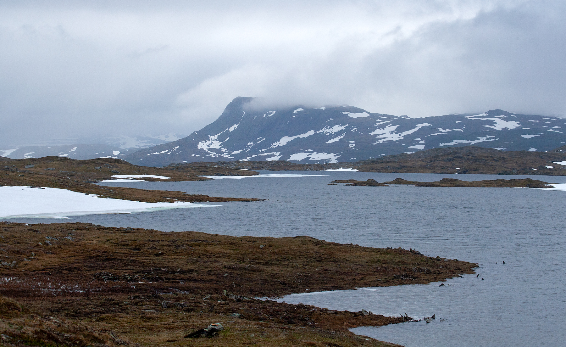 Gieddoajvejávrátja.